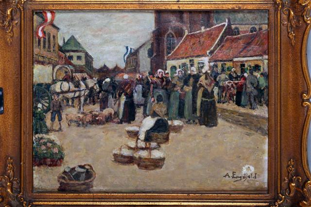 Albert Engstfeld: Marktszene (vor 1914)